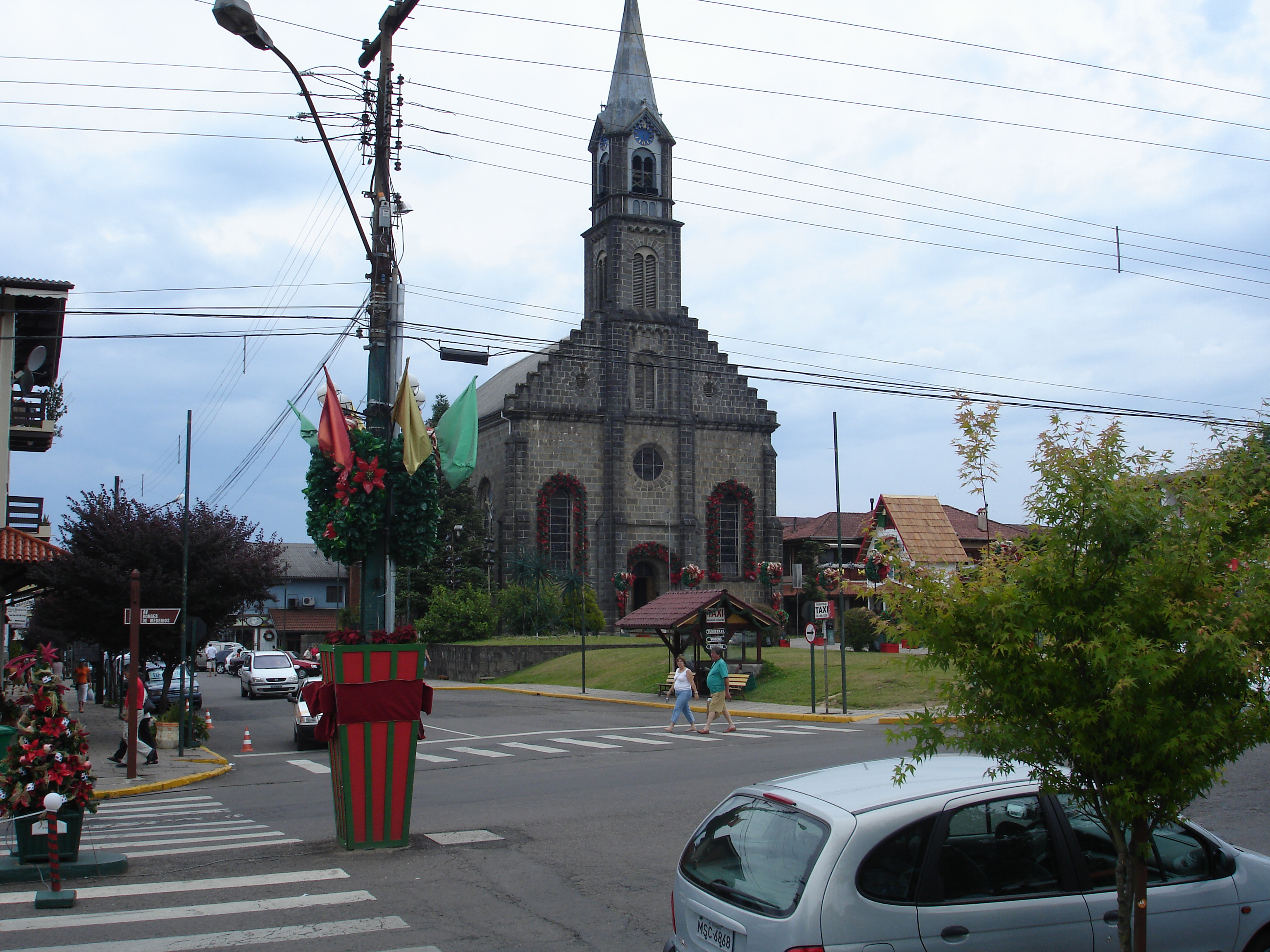 Igreja em Gramado